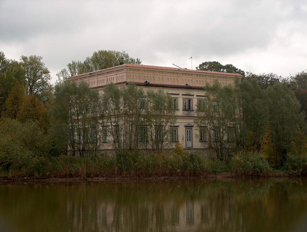 Zamek bastionowy Firlejów, Czemierniki